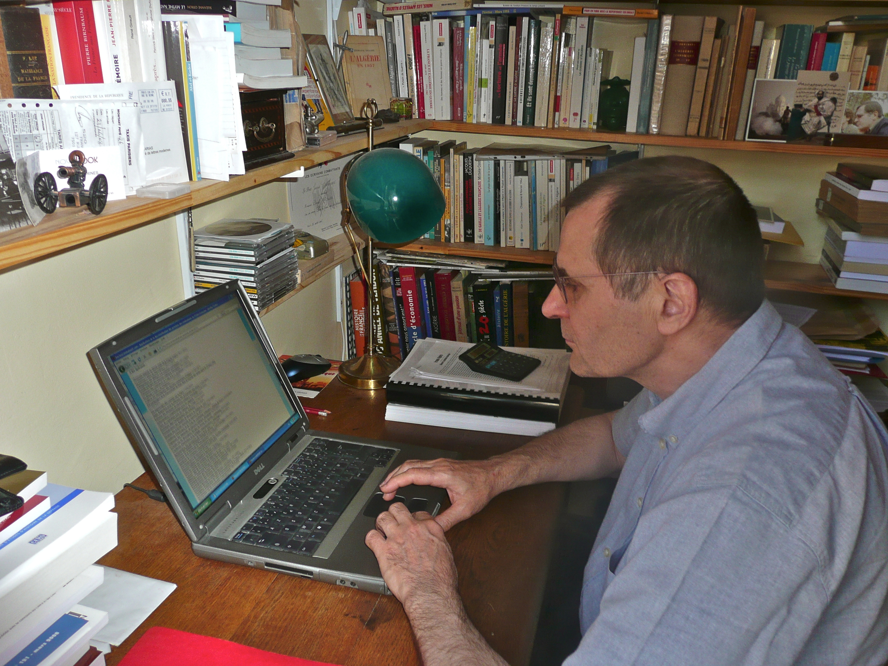 Daniel Lefeuvre, 24 juin 2008.